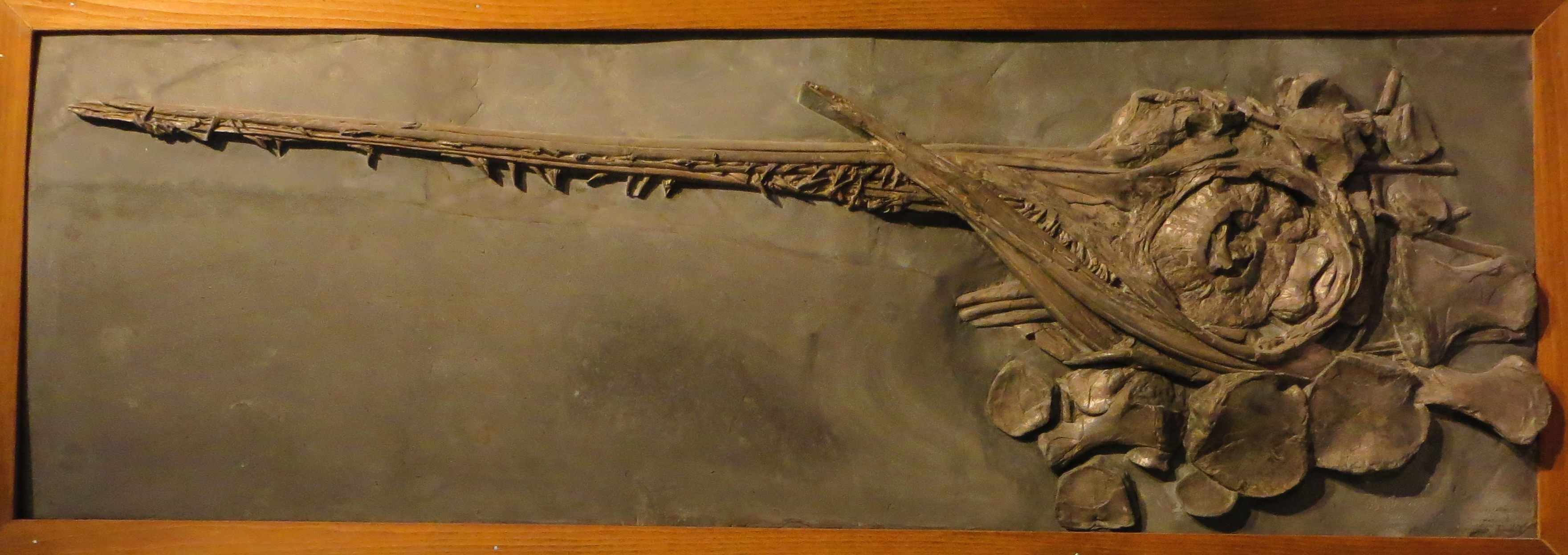 Fossil of Eurhinosaurus, an extinct reptile- Took the picture at Museum of Paleontology, Tuebingen